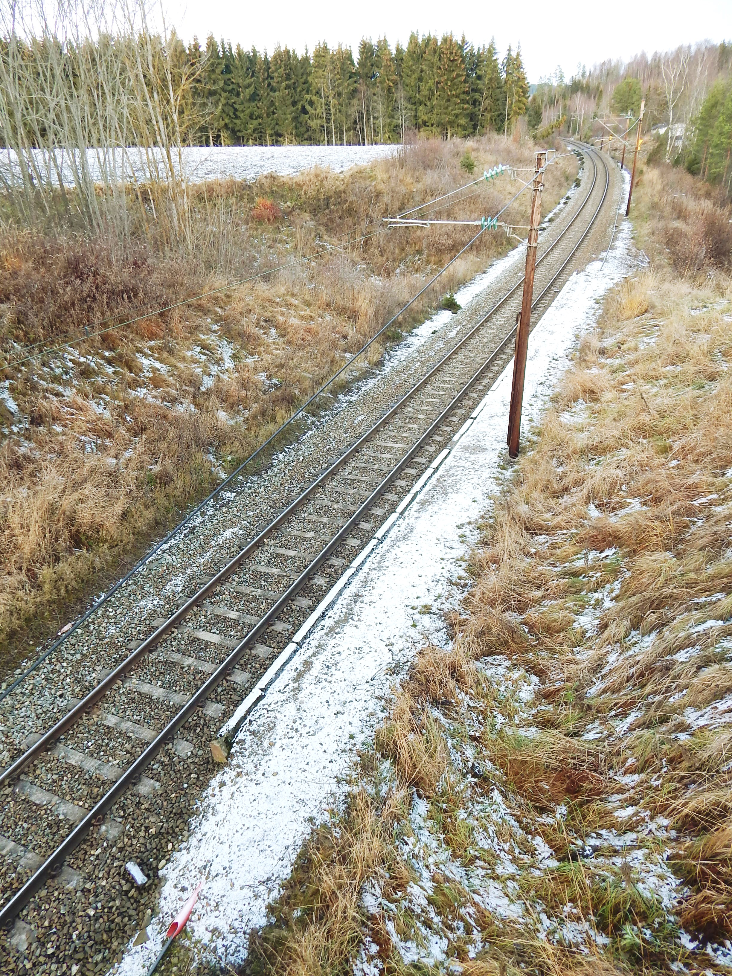 Hagabru holdeplass på Randsfjordbanen